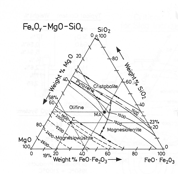 Třísložkový diagram strusek. Vlastní publikace. I.Henych: Some4 Metallurgical Aspects of Producing Ductile Iron and Holding Treated Metal, AFS Transactions 86-103 S.609